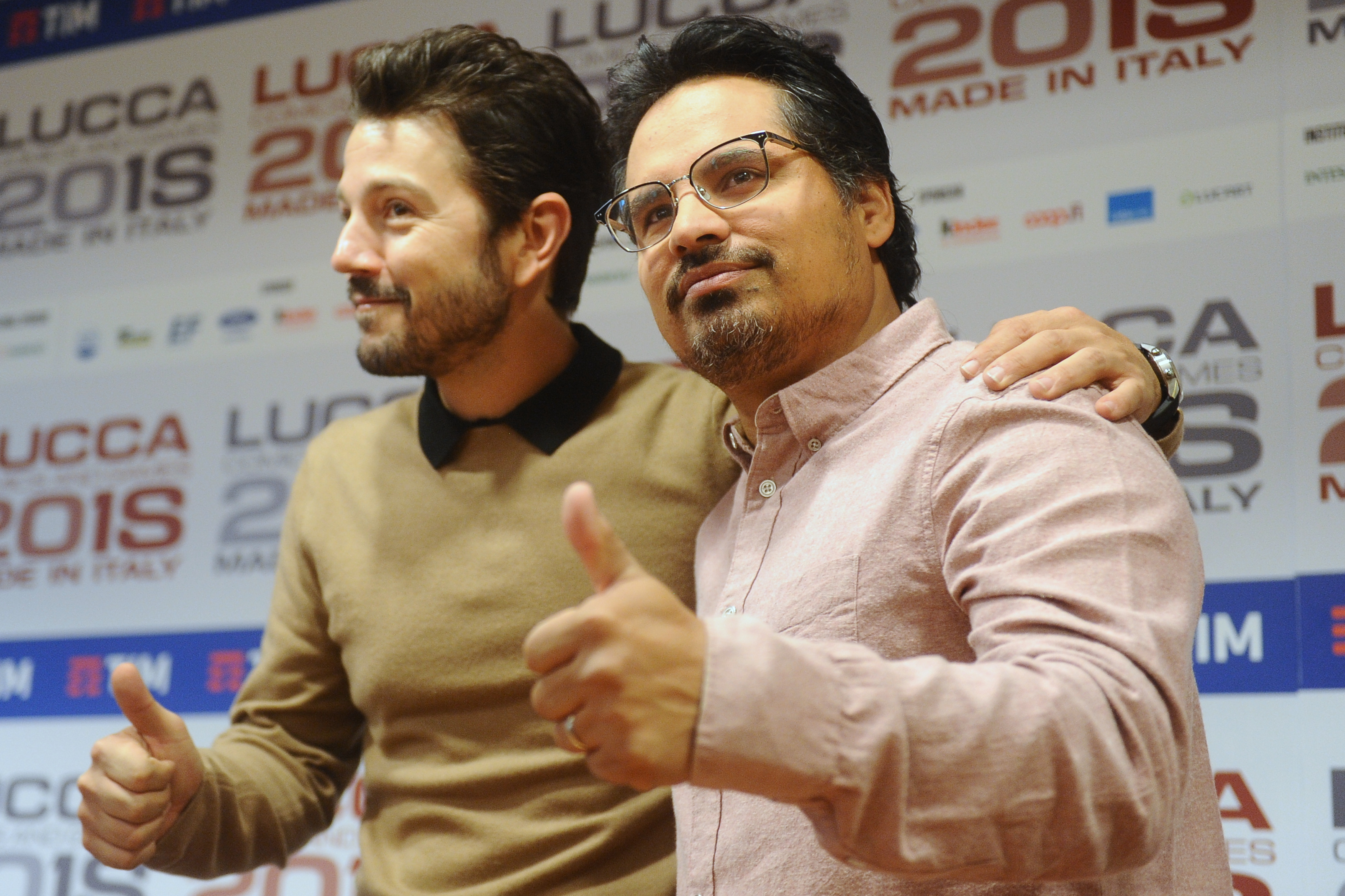 Diego Luna e Michael Peña, protagonisti di Narcos: Mexico a Lucca Comics & Games. Conferenza stampa in Camera di Commercio.